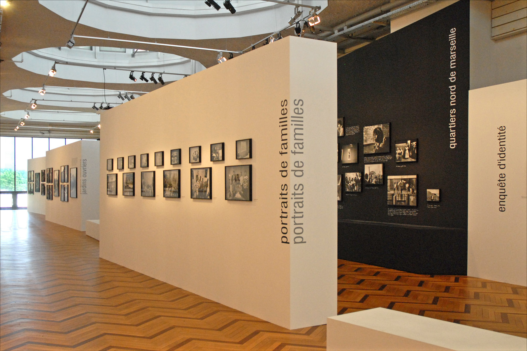 Exposition temporaire "Ma proche banlieue" Patrick Zachmann - Photographies 1980-2007 L’exposition permanente « Repères » de la Cité nationale de l'histoire de l'immigration retrace deux siècles d’immigration en France, en montrant la part importante prise par les immigrés dans le développement économique, social et culturel de la France. Elle est accompagnée par des expositions temporaires.